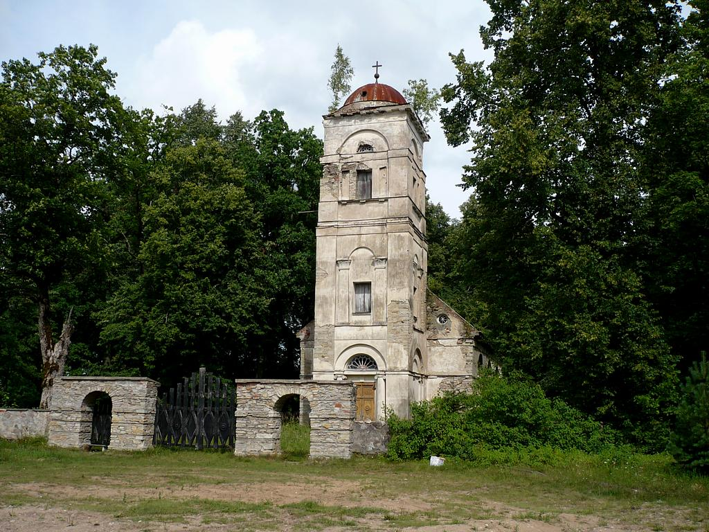 Saļienas baznīca 2008-08-10